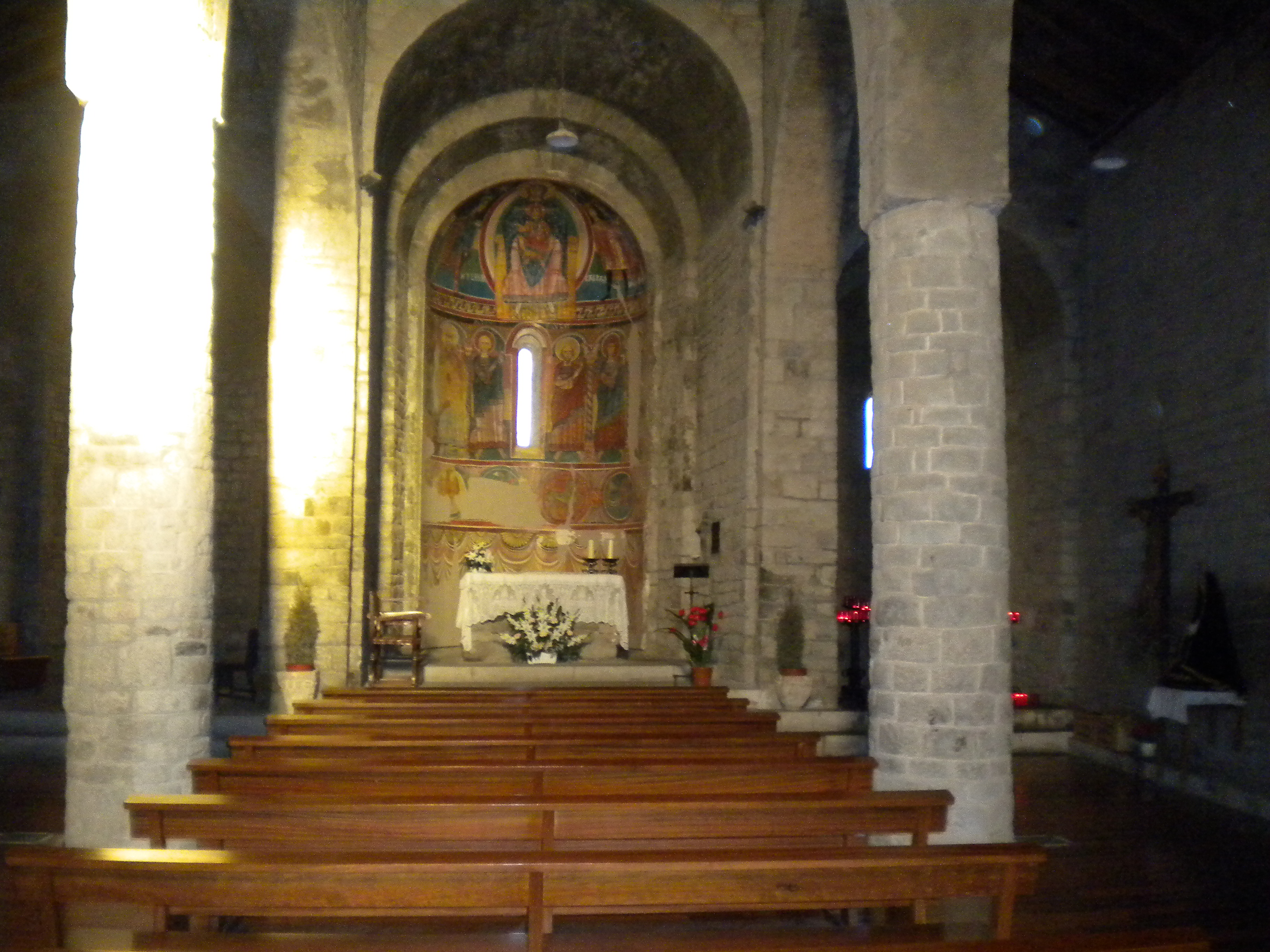 Interior de l'església romànica de Santa Maria de Taüll, amb la reproducció de les pintures murals. Terme municipal de la Vall de Boí, a l'Alta Ribagorça.